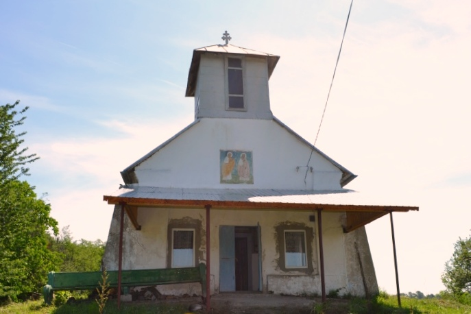 Biserica „Sfinţii Apostoli”, sat Gutu; comuna Prunișor La intrarea în sat 1863